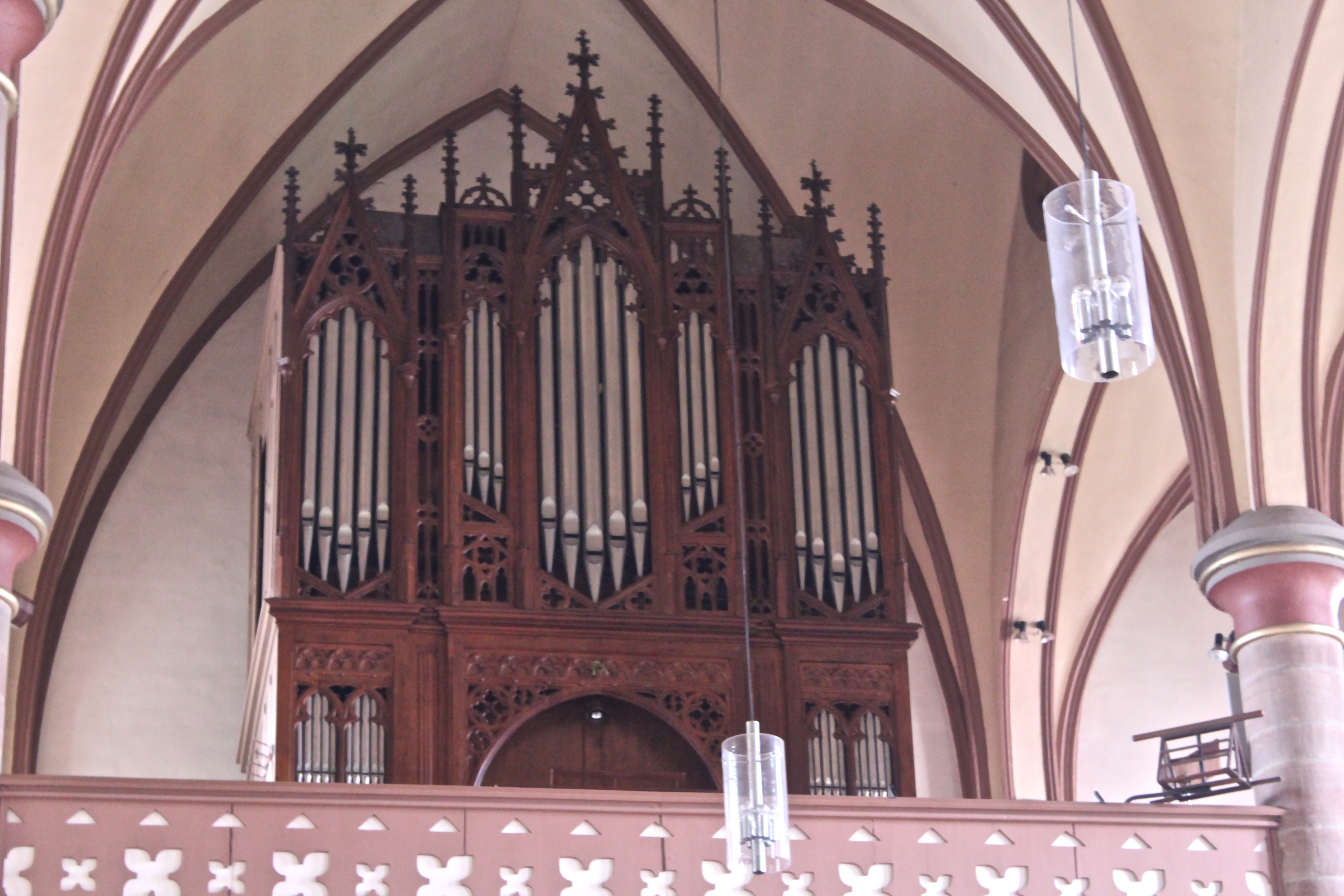 Pipe organ of Église Saint-Étienne (Bissen)